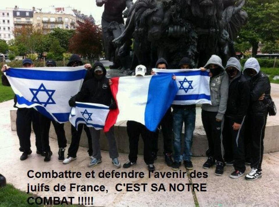 LIGUE de DÉFENSE JUIVE. Faute d'orthographe : c'est sa notre combat au lieu de c'est ça notre combat